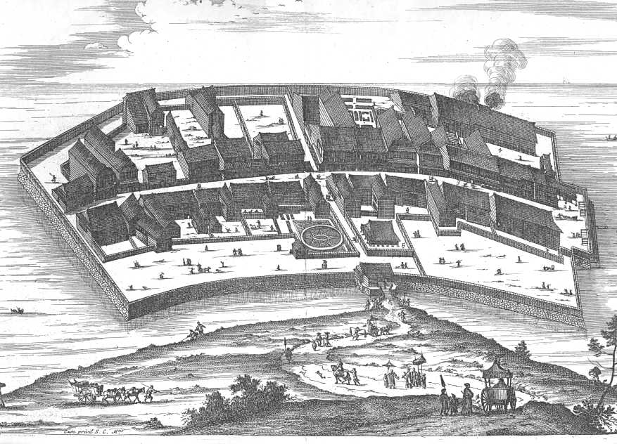 Dejima / Deshima Sitz der Handelsniederlassung der niederländischen Ostindien-Kompanie in Nagasaki (Japan) während der Edo-Zeit